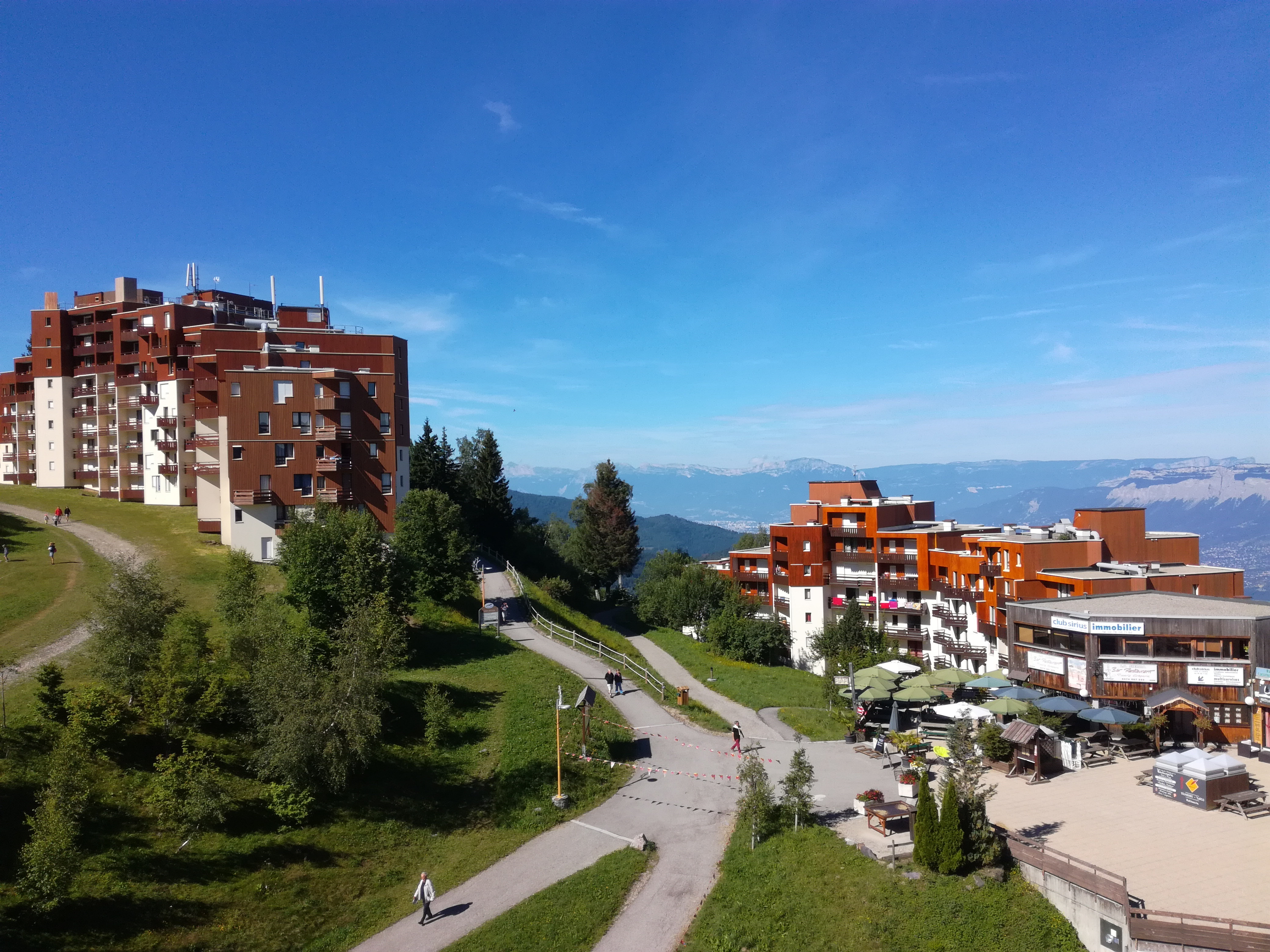 Vue de hauteur sur Prapoutel